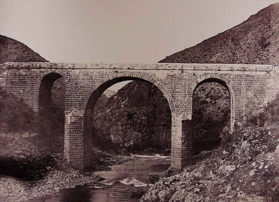 Ponte de Bibei fotografiada por Jean Laurent no século XIX.